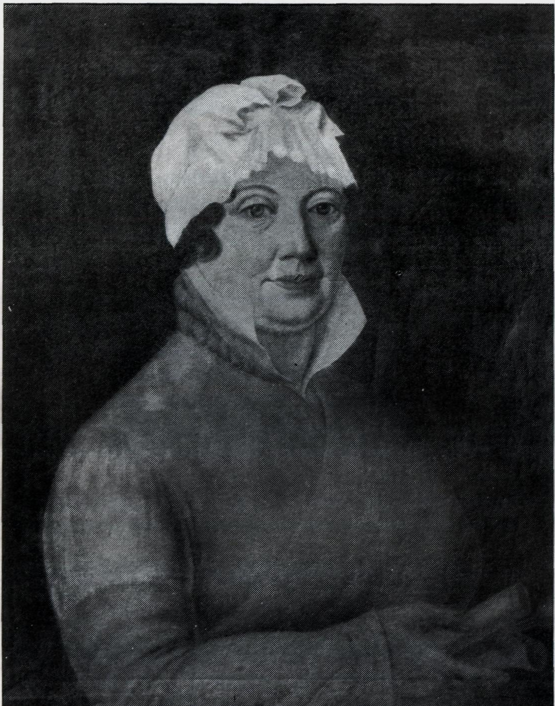 Den norske forfatteren Christiane Koren (1764–1815)